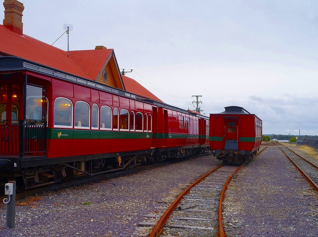 オーストラリア、ストラーン、ショッピングセンター